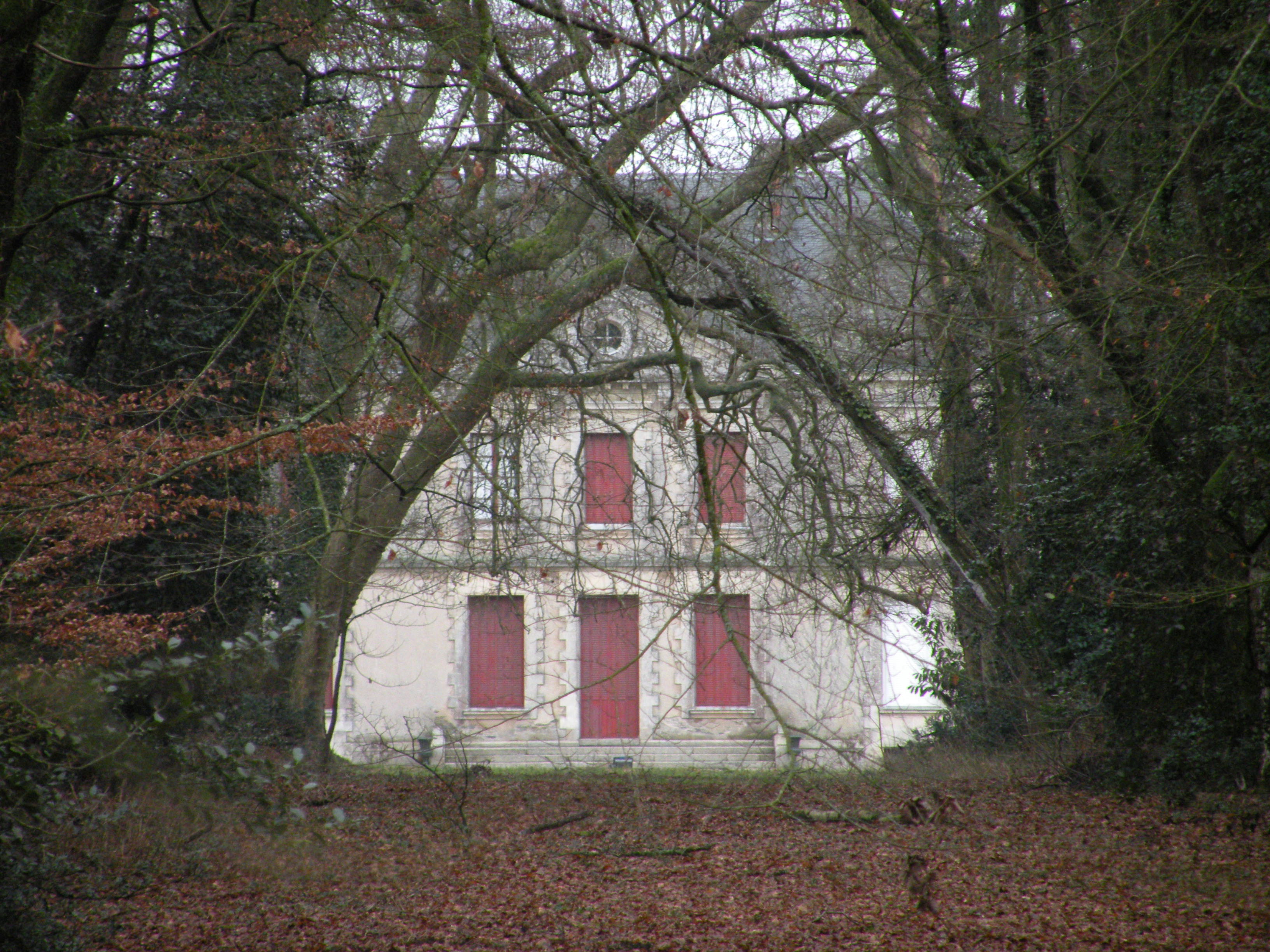 Façade du château de la Touche à Nozay.